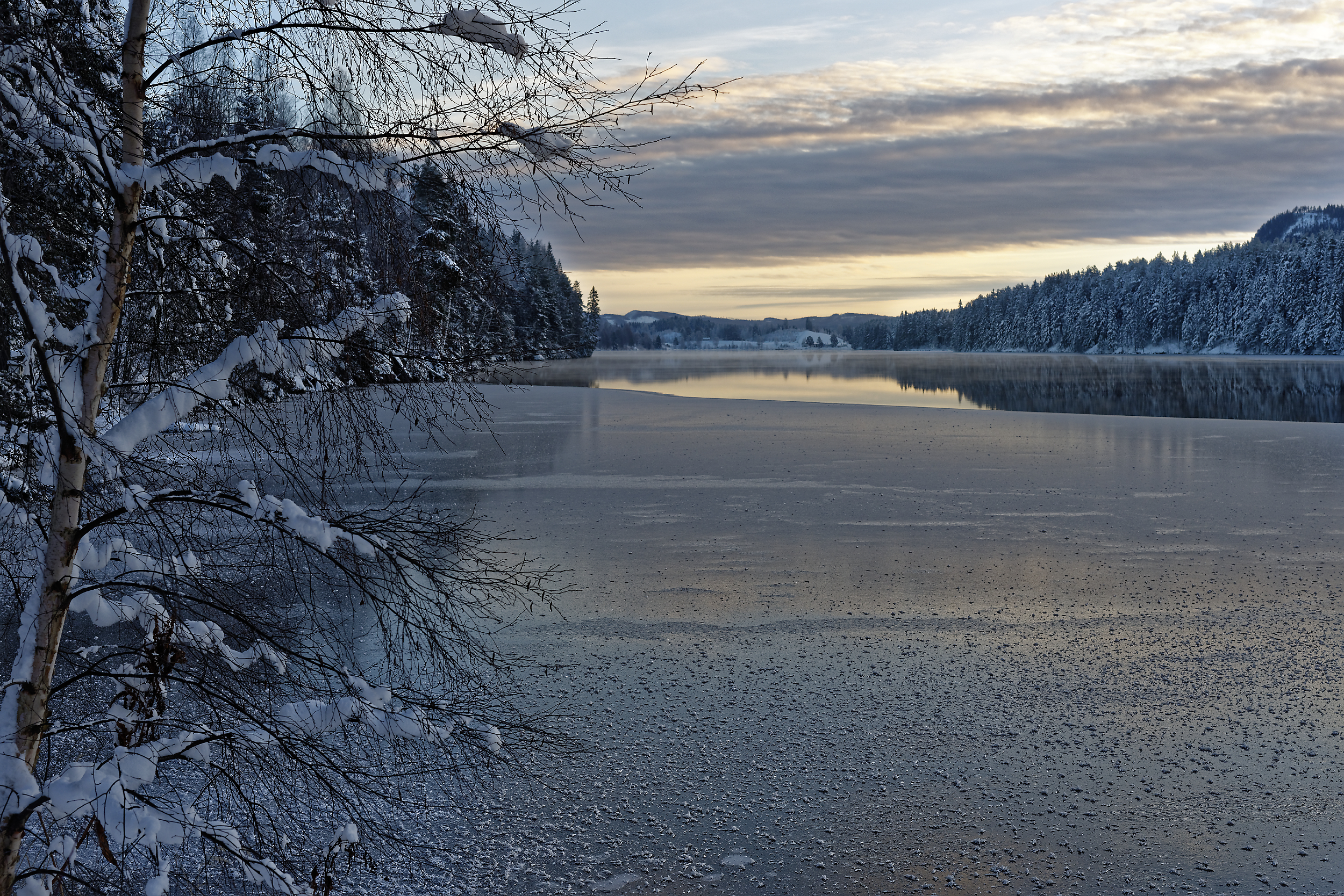 Österdalälven strax söder om Älvdalen